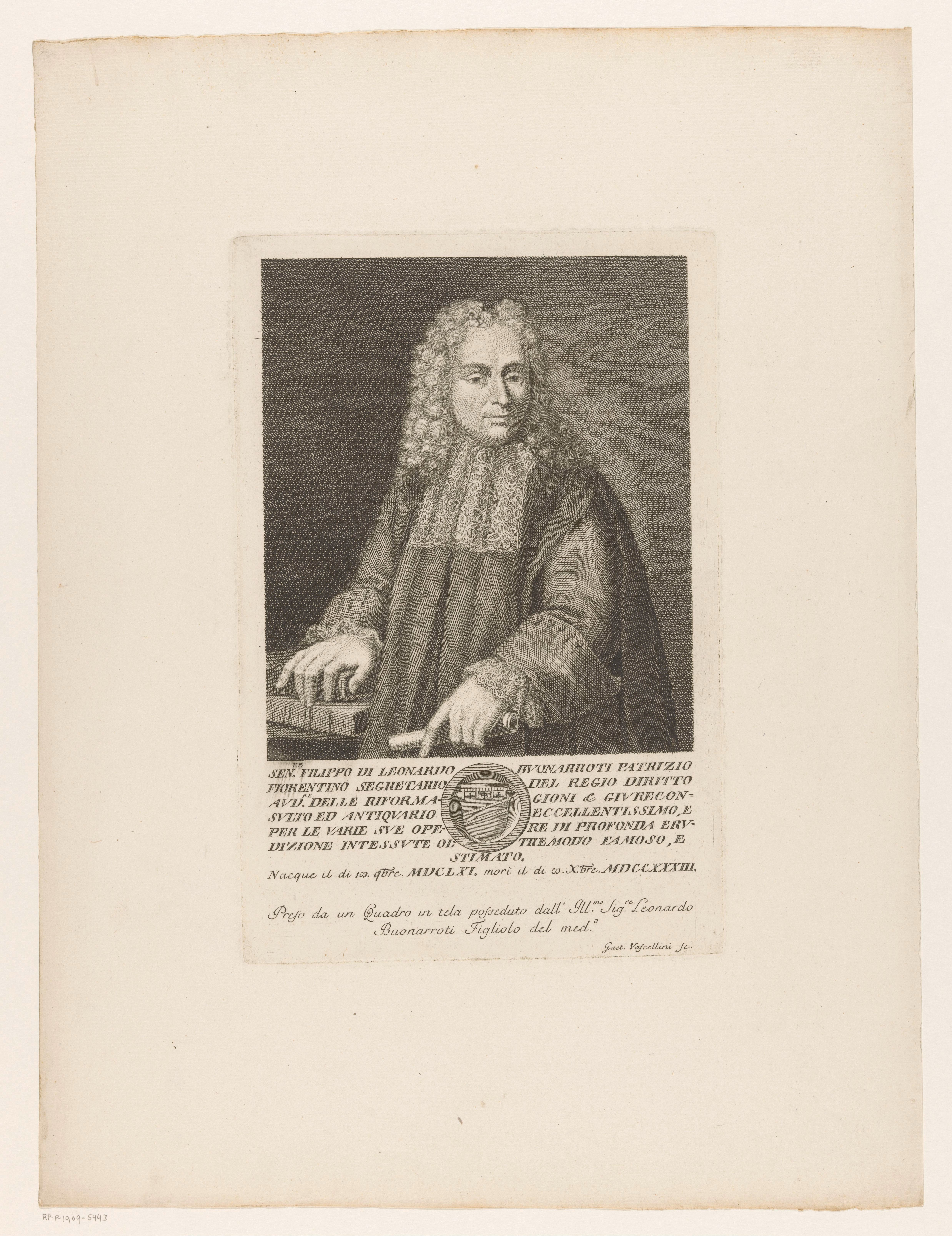 IdentificatieTitel(s): Portret van antiquair Filippo BuonarrotiObjecttype: prent Objectnummer: RP-P-1909-5443Opschriften / Merken: verzamelaarsmerk, verso, gestempeld: Lugt 2228Omschrijving: Onder het portret een tekst in het Italiaans en een wapenschild in een cirkelvormig kader.VervaardigingVervaardiger: prentmaker: Gaetano Vascellini (vermeld op object)naar schilderij van: onbekend (vermeld op object)Plaats vervaardiging: ItaliëDatering: 1755 - 1805Fysieke kenmerken: ets en gravureMateriaal: papier Techniek: graveren (drukprocedé) / etsenAfmetingen: plaatrand: h 298 mm × b 198 mmOnderwerpWat: historical personsWie: Filippo BuonarrotiVerwerving en rechtenVerwerving: aankoop 1905Copyright: Publiek domein